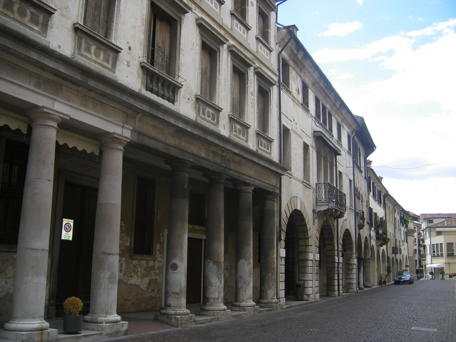 Conegliano